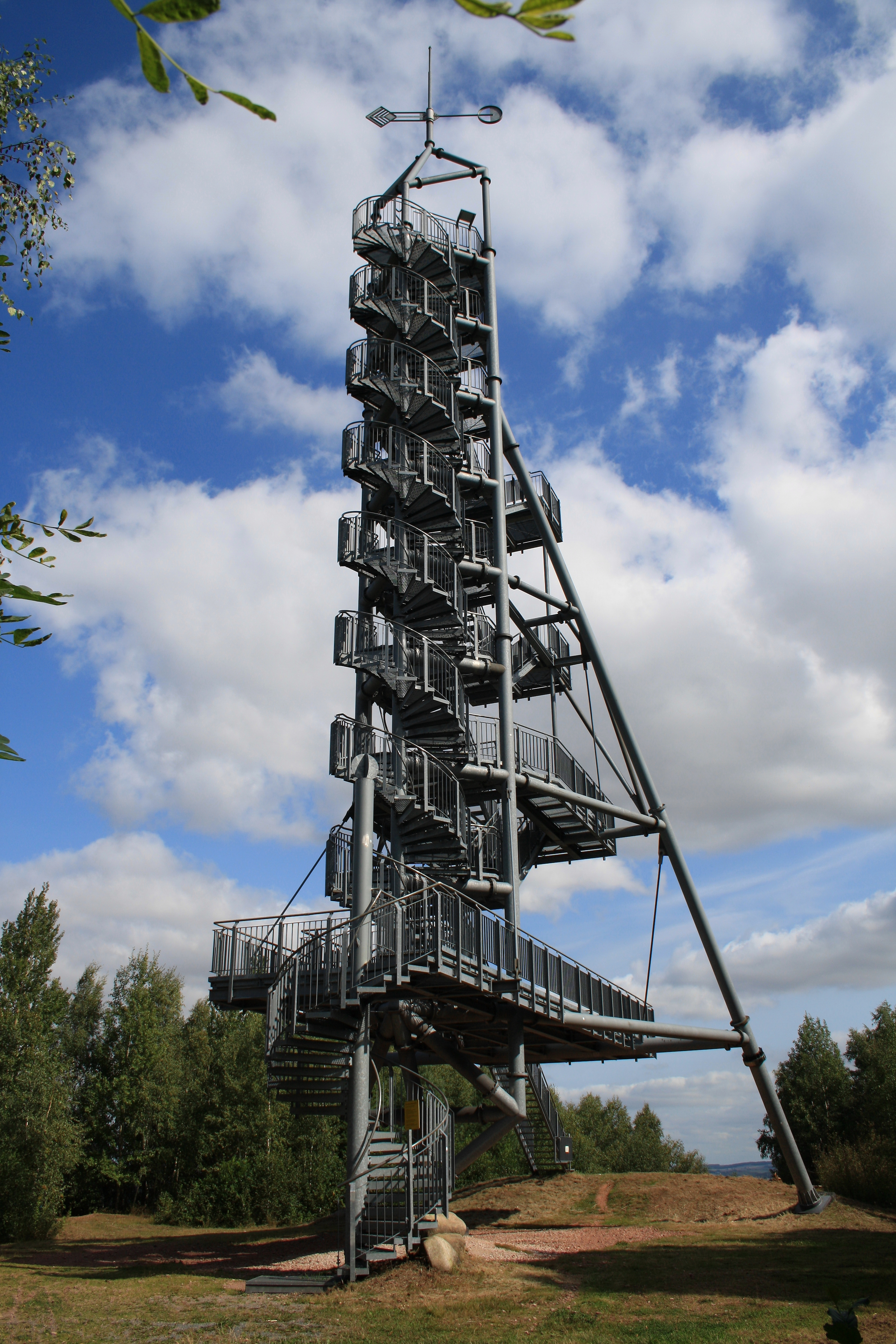 Der Glückaufturm ist ein in Stahlfachwerkbauweise ausgeführter Aussichtsturm in der Stadt Oelsnitz im Erzgebirge (Erzgebirgskreis, Sachsen) von ungewöhnlicher Bauform. Er steht auf der Abraumhalde des Deutschlandschachtes, einem ehemaligen Steinkohle-Bergwerk, auf einer Höhe von 487 Meter über NN. Der im Jahr 2000 errichtete Glückaufturm ist 36 Meter hoch und wurde vom Architekturbüro Bernd Sikora in Leipzig entworfen und von der Firma Stahlbau Weichlitz errichtet. Bauherr des Turms war die Stadt Oelsnitz. Baubeginn war am 21. Juni 2000, die Einweihung erfolgte am 21. November 2000. Das Gewicht der Turmkonstruktion beträgt 81,7 Tonnen und das Volumen der Fundamente 62,3 Kubikmeter.